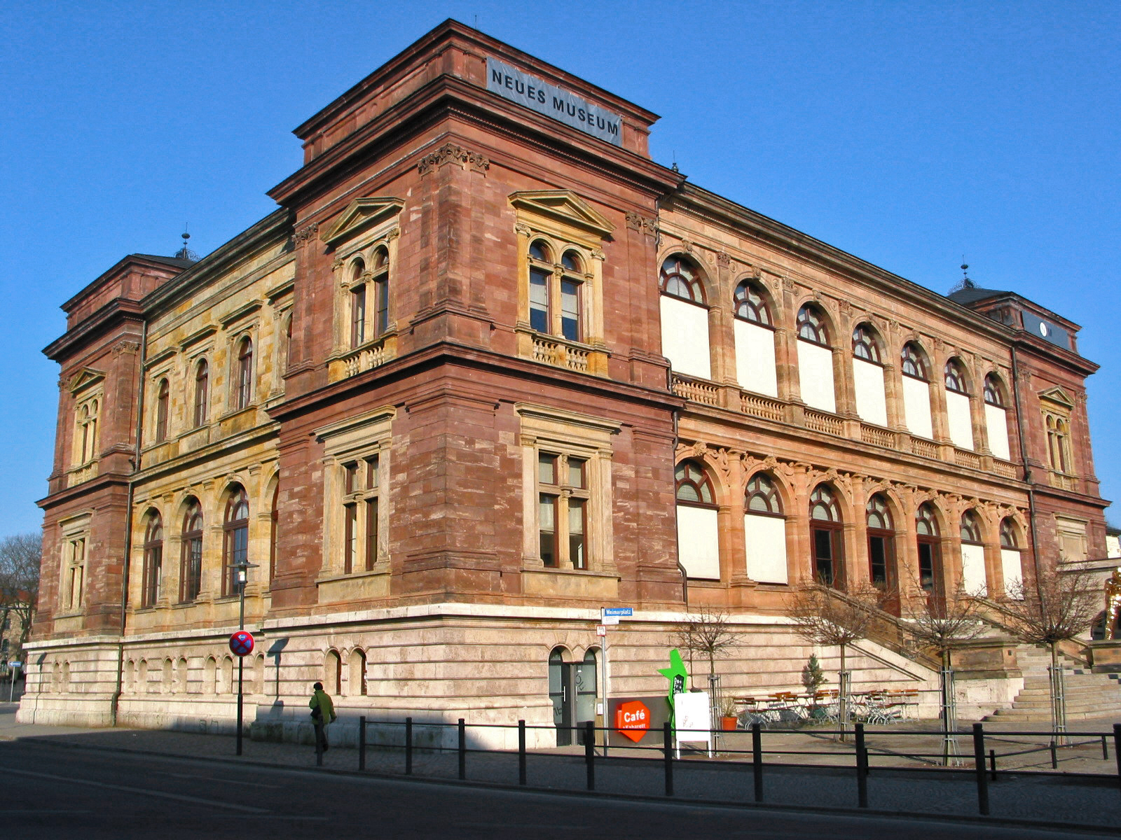 Das Neue Museum in Weimar (ehemaliges Landesmuseum Sachsen-Weimar-Eisenach).